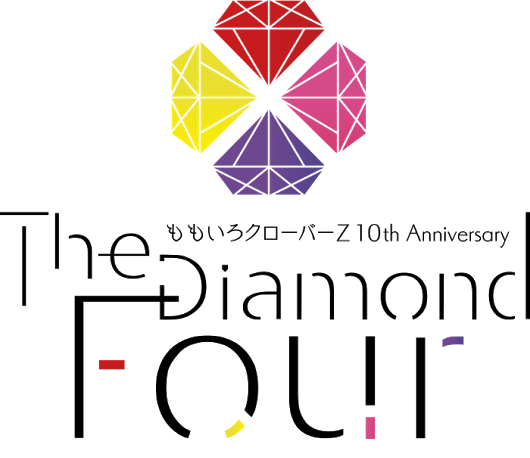 ももいろクローバーZ 10周年ロゴ